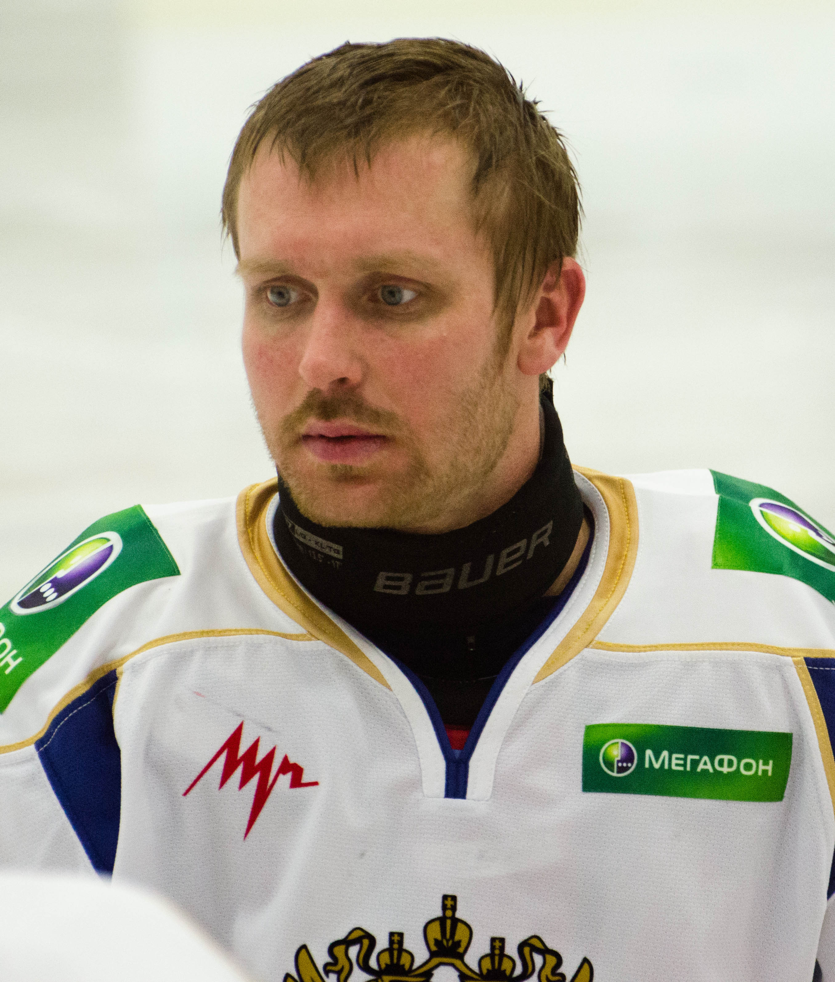 Ilia Popov, 2015